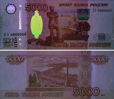 Билет Банка России в 5000 рублей модификации 2010 года в ультрафиолете